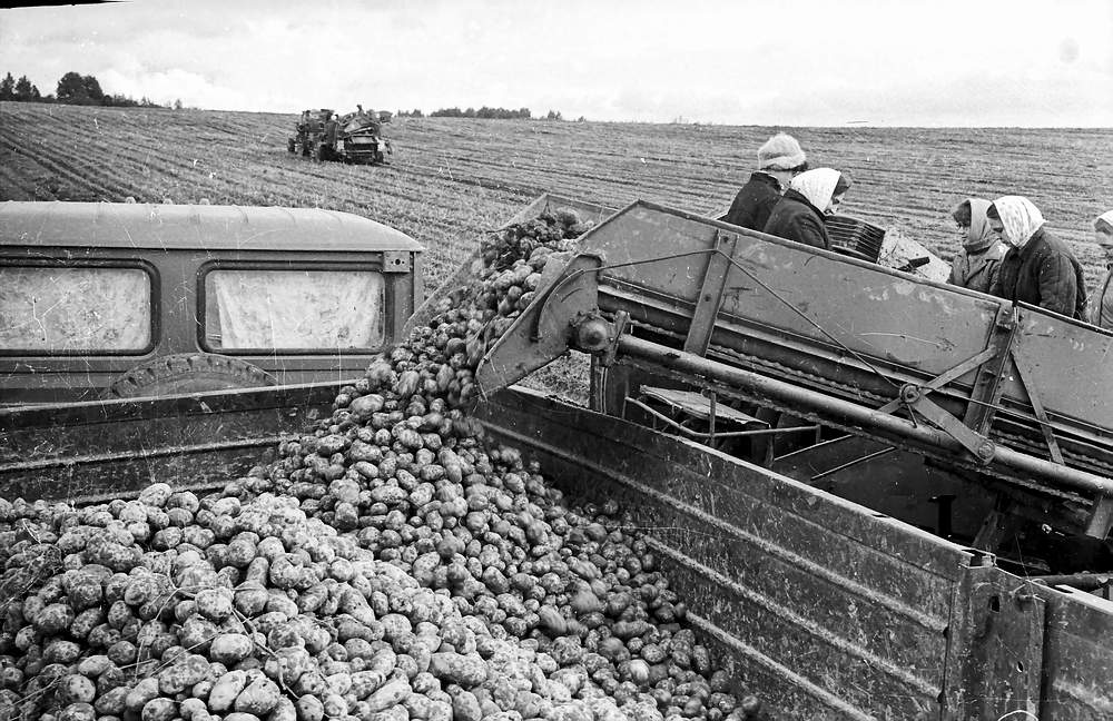 Работает картофелеуборочный комбайн в совхозе «Глебовский». В работе ему помогают работники швейной фабрики, кирпичного завода, мебельного цеха, сырзавода, горисполкома, центральной районной больницы и художники из дома творчества, прибывшие в Переславль из разных уголков страны в творческую командировку. Все трудятся с огоньком. Сельские и городские жители проявили общую заботу об урожае, ответственность за свой труд. В этот день общими усилиями картофель был убран с одиннадцати гектаров. Деревня Антуфьево, Переславский район. (Переславский музей-заповедник, отдел истории советского общества, конверт 1083. По газетному списку номер 28.)